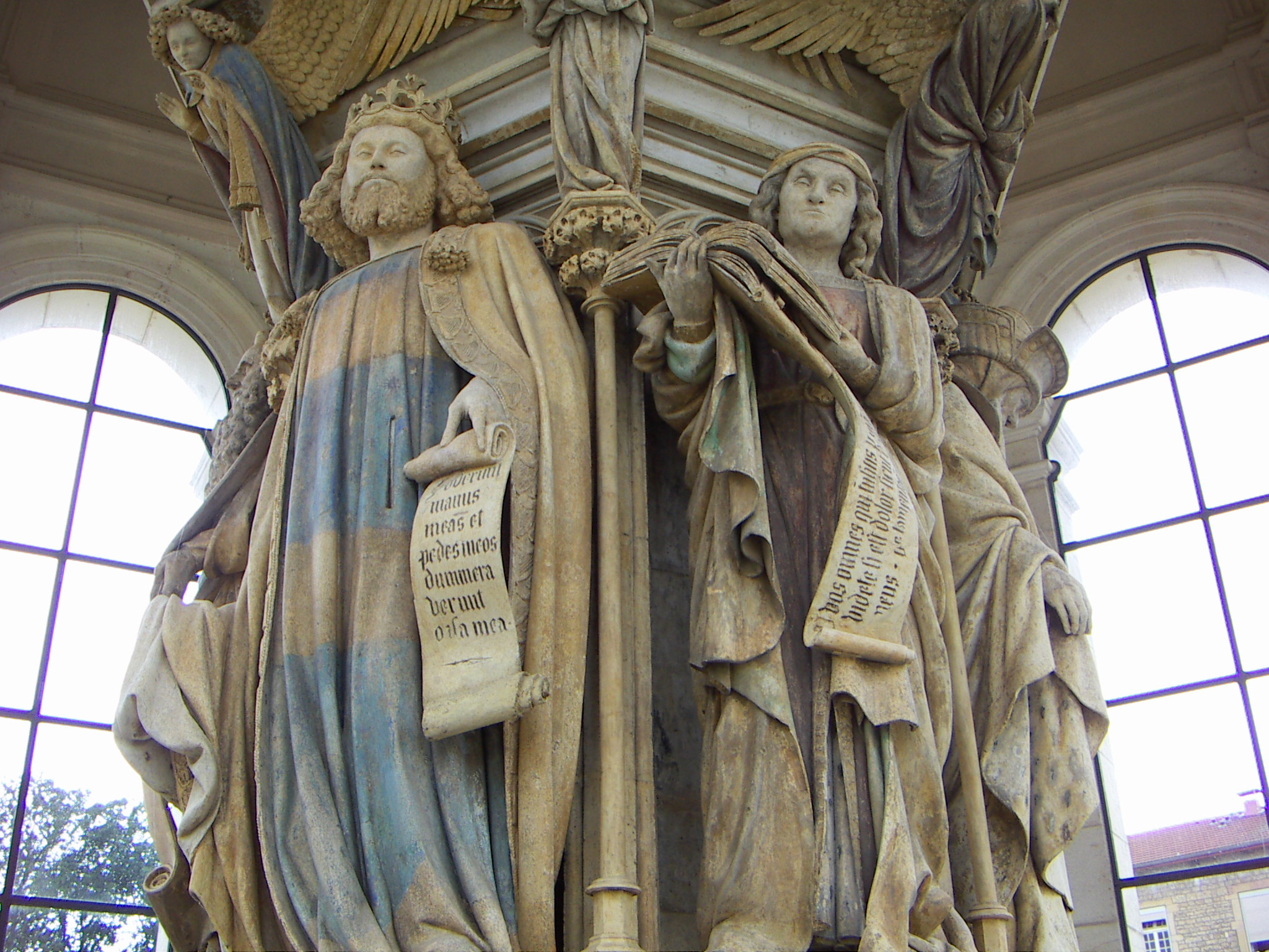 Puits de Moise, Dijon